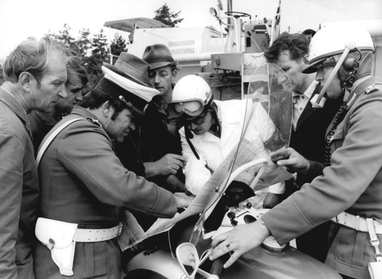 Erntehelfer im Gespräch mit Volkspolizisten ADN-ZB Spremberg 20.8.1972 50 Mähdrescher des Tpys E 512 aus zehn Kreisen des Bezirks Cottbus gingen am 20.8.72 auf Fahrt in den Bezirk Neubrandenburg. Die 100 Erntekapitäne und 10 Reparaturbrigaden werden dort sozialistische Hilfe leisten. Während der mehr als zehnstündigen Reise gaben Genossen der VP dem Konvoi sicheres Geleit.